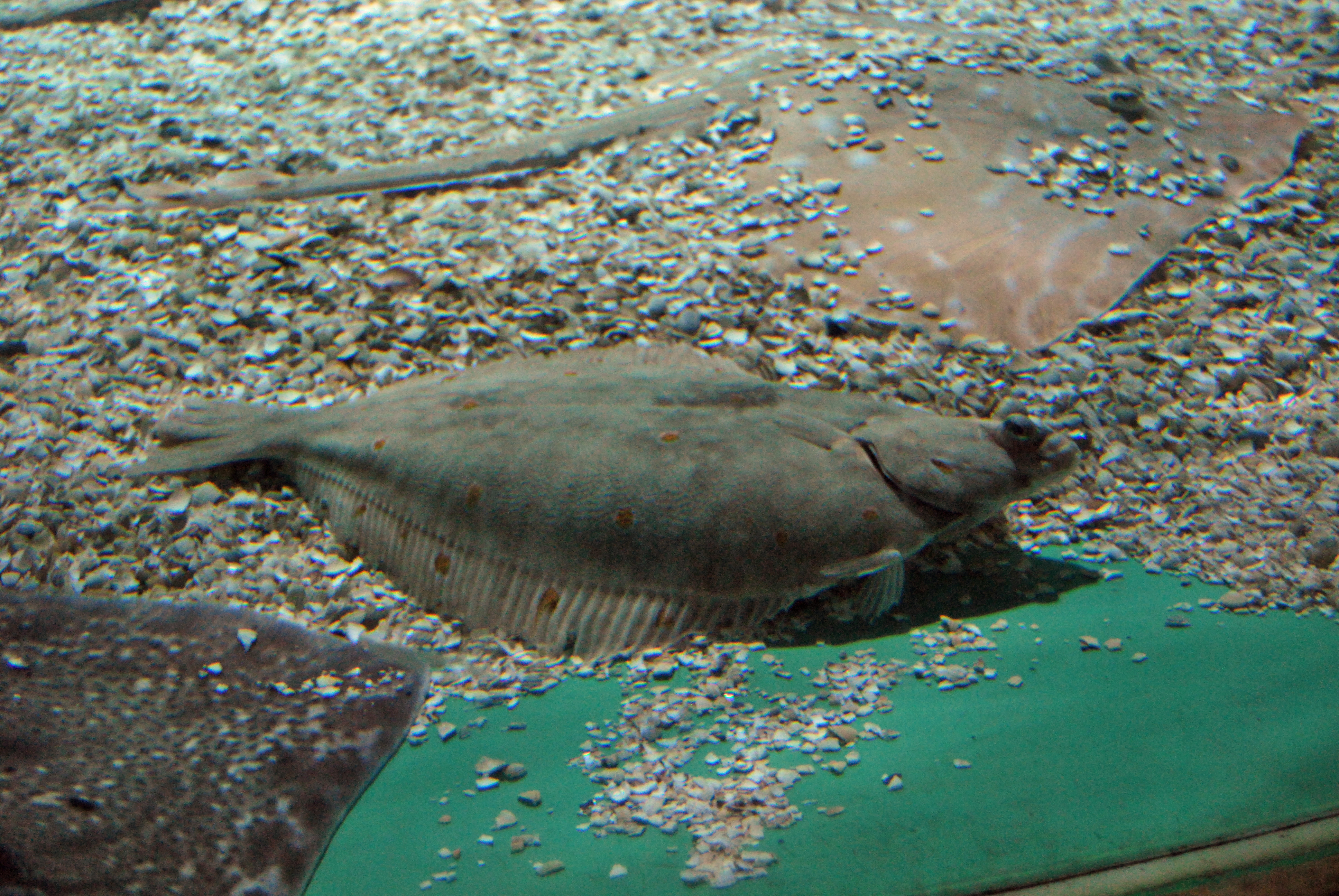 Plattfisch, Sea Life Konstanz